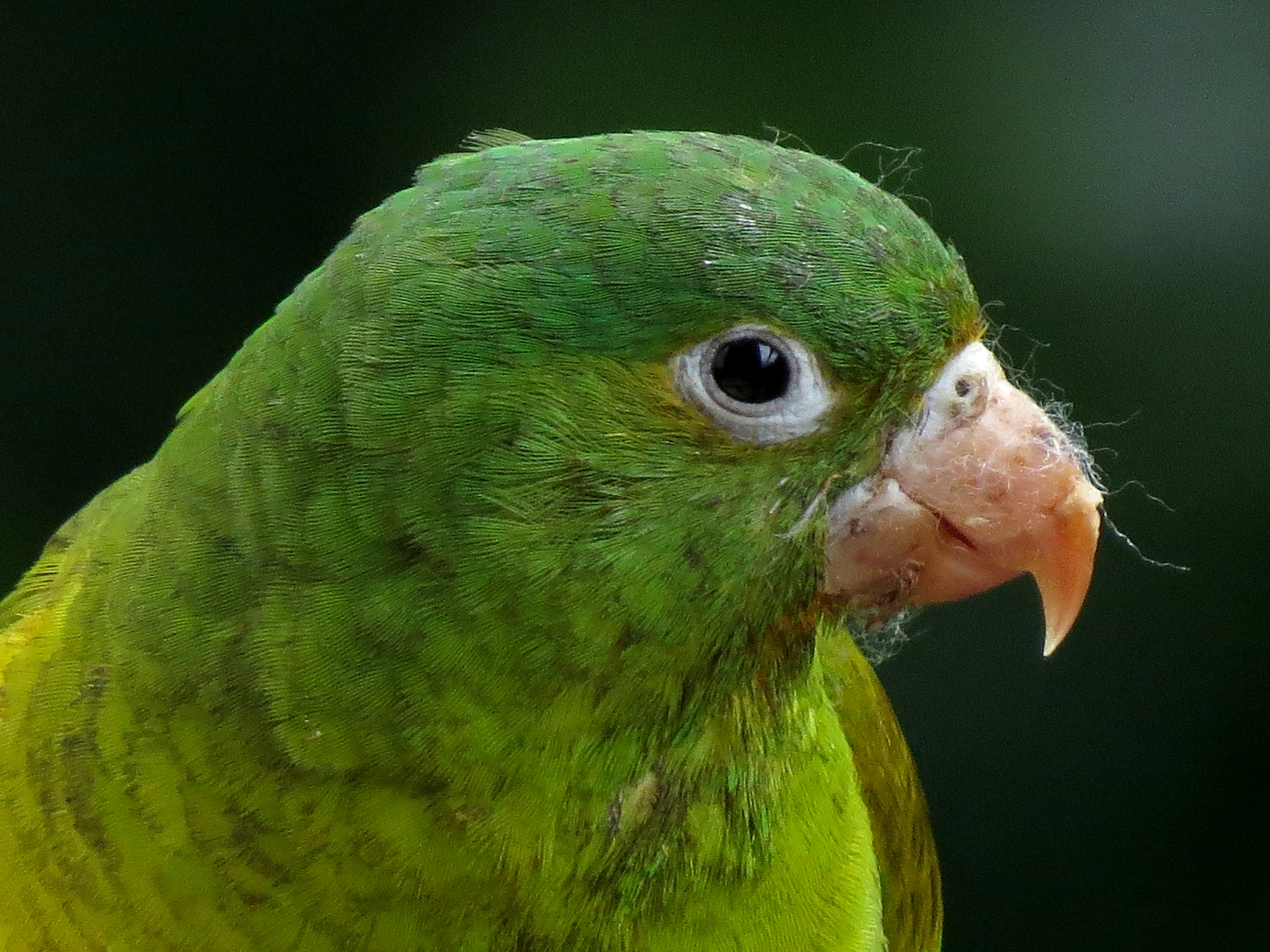 Brotogeris jugularis (Perico bronceado)